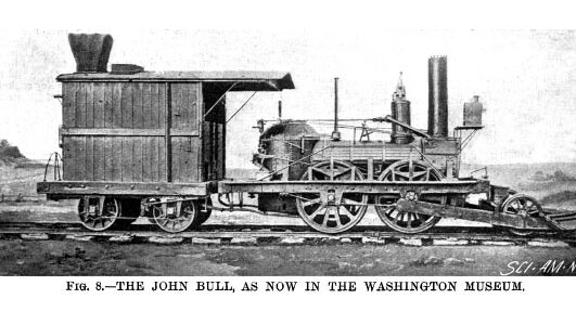 Lokomotive "John Bull" nach dem Umbau Zeitgenössische Darstellung